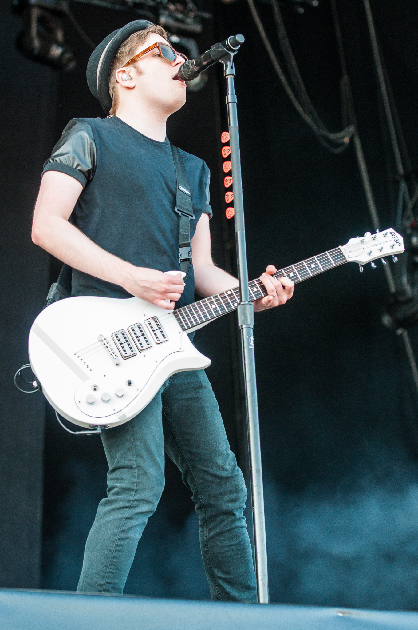 ARGO-Konzerte,Centerstage,Fall Out Boy,Konzert,Livekonzert,Livemusik,Musik,Patrick Stump,RiP,Rock im Park 2014